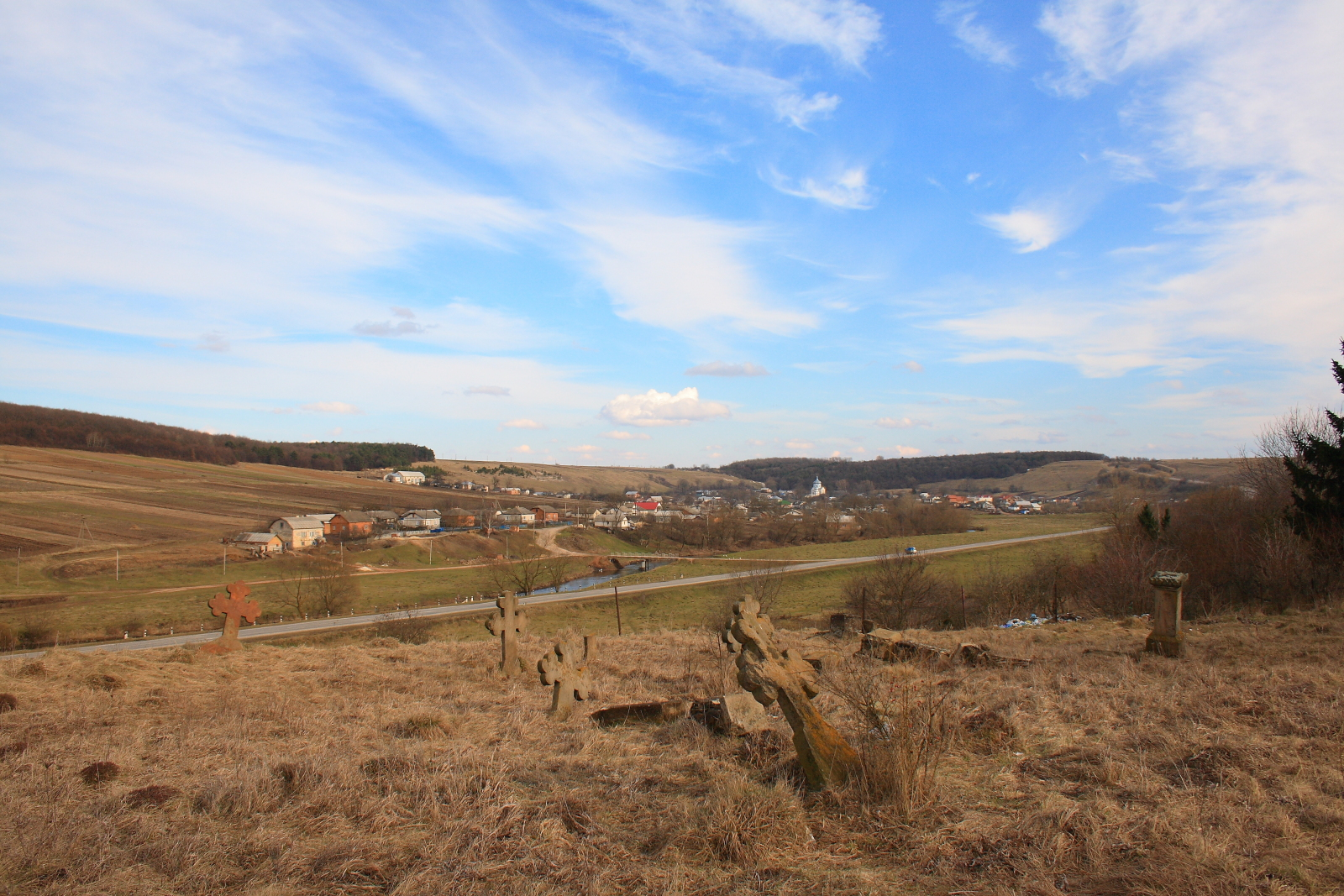 Микулинці католицький цинтар, вигляд на село Воля, дорогу Т 2020